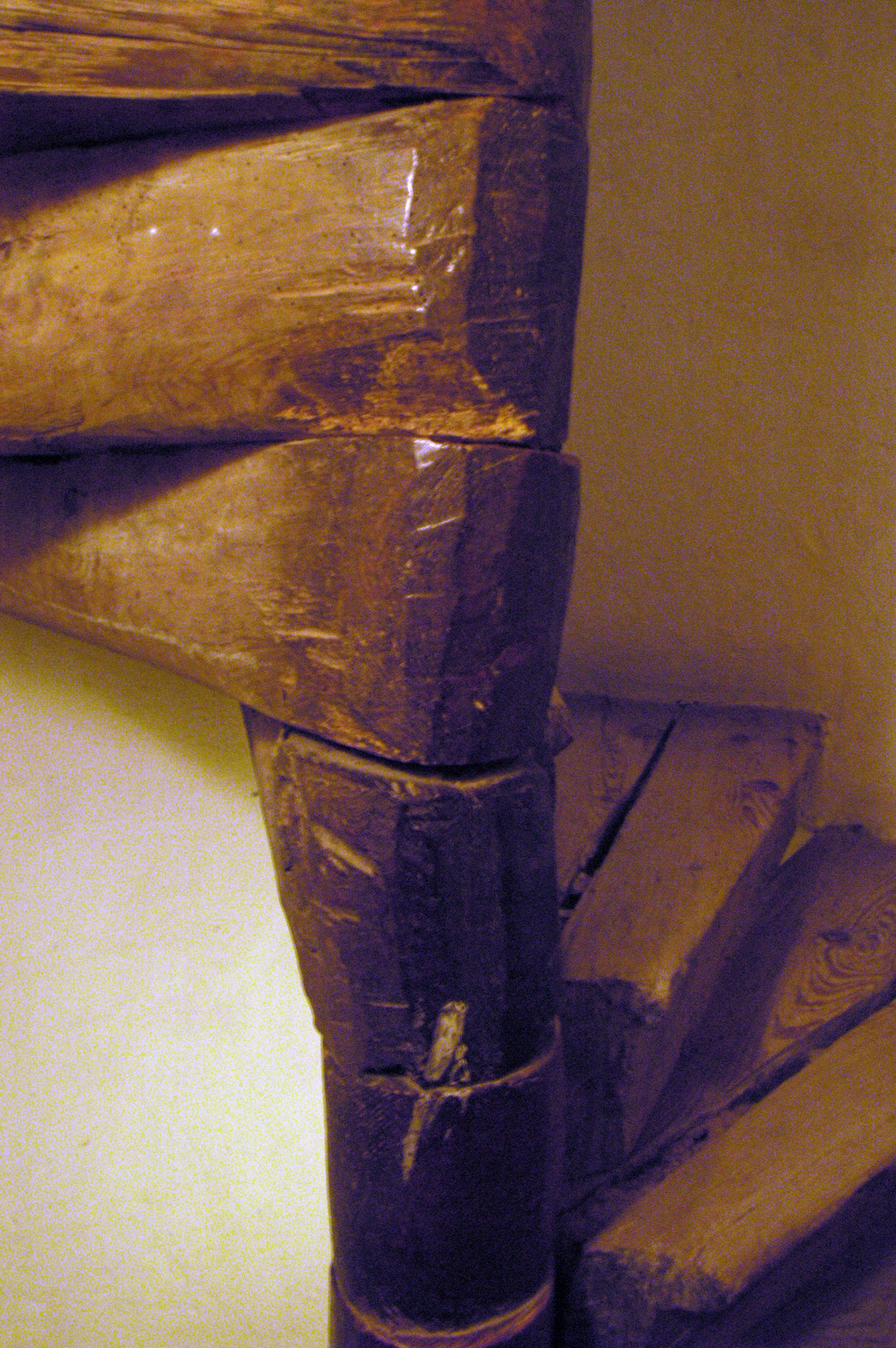 Wendeltreppe aus Holz zur Empore der katholischen Pfarrkirche heiliger Jakobus der Ältere in Eggendorf am Walde